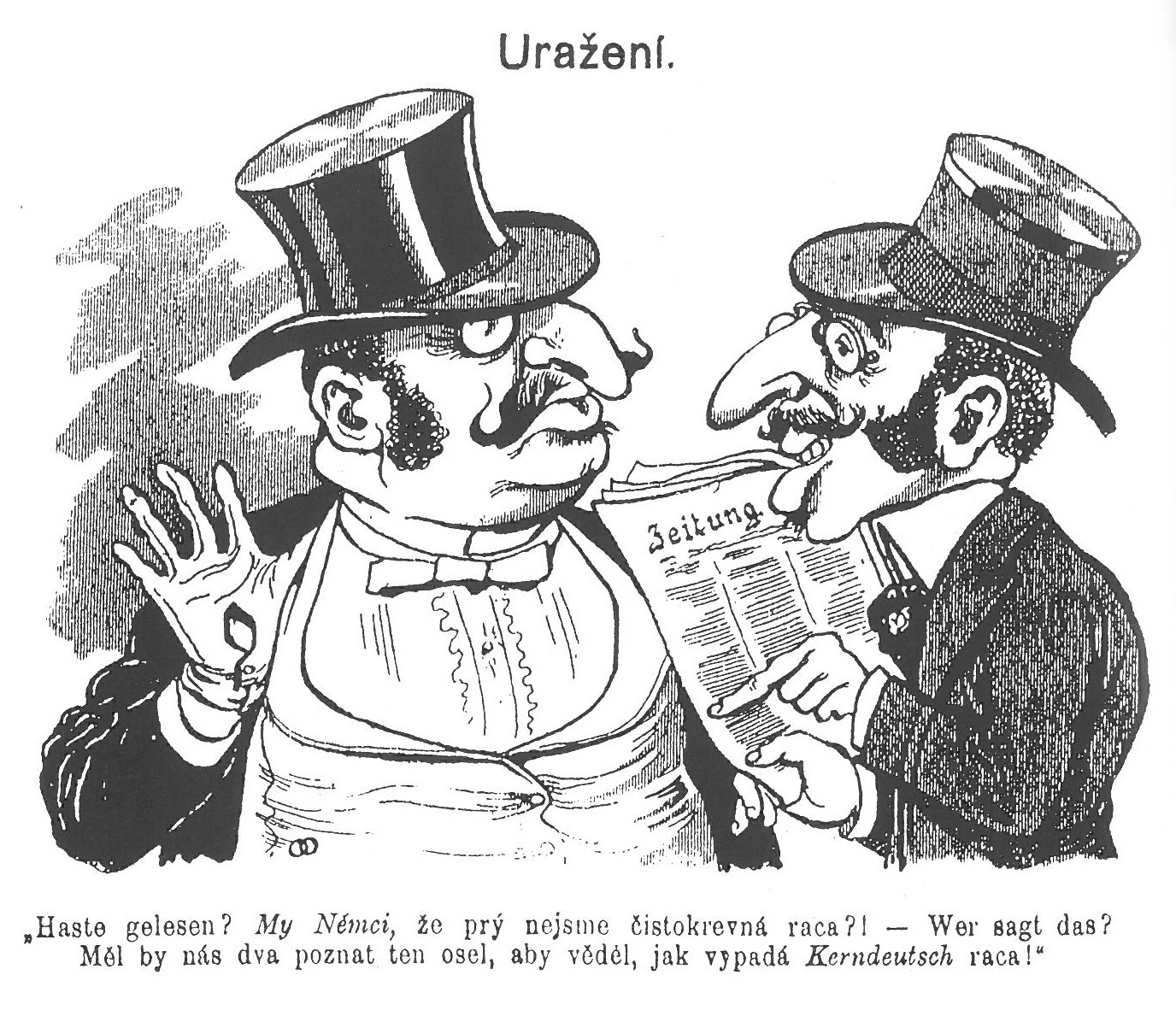 Karikatur zweier Juden, die sich über die „Kerndeutsch raca“ (reine deutsche Rasse) amüsieren. In den tschechischen Karikaturen jener Zeit wird das Judentum mit dem Deutschtum oft gleichgesetzt.